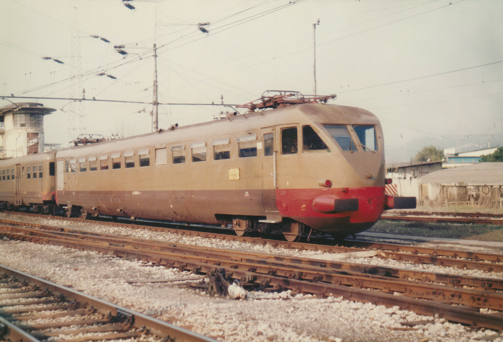 Treno locale per Lucca, fotografato nella stazione di Viareggio. In primo piano un'elettromotrice ALe 790.